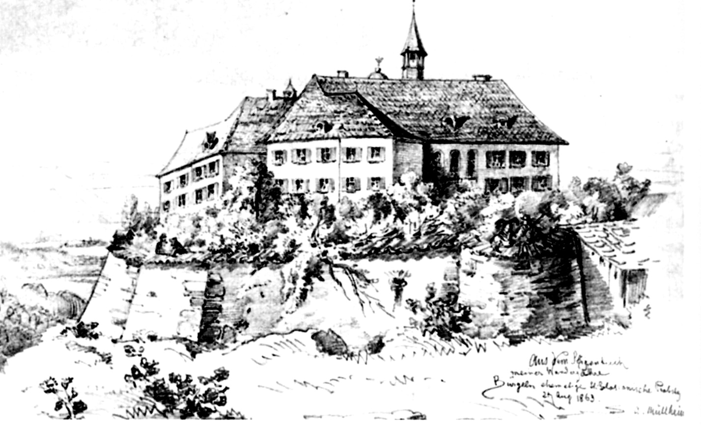 Schloss Bürgeln - Lithographie